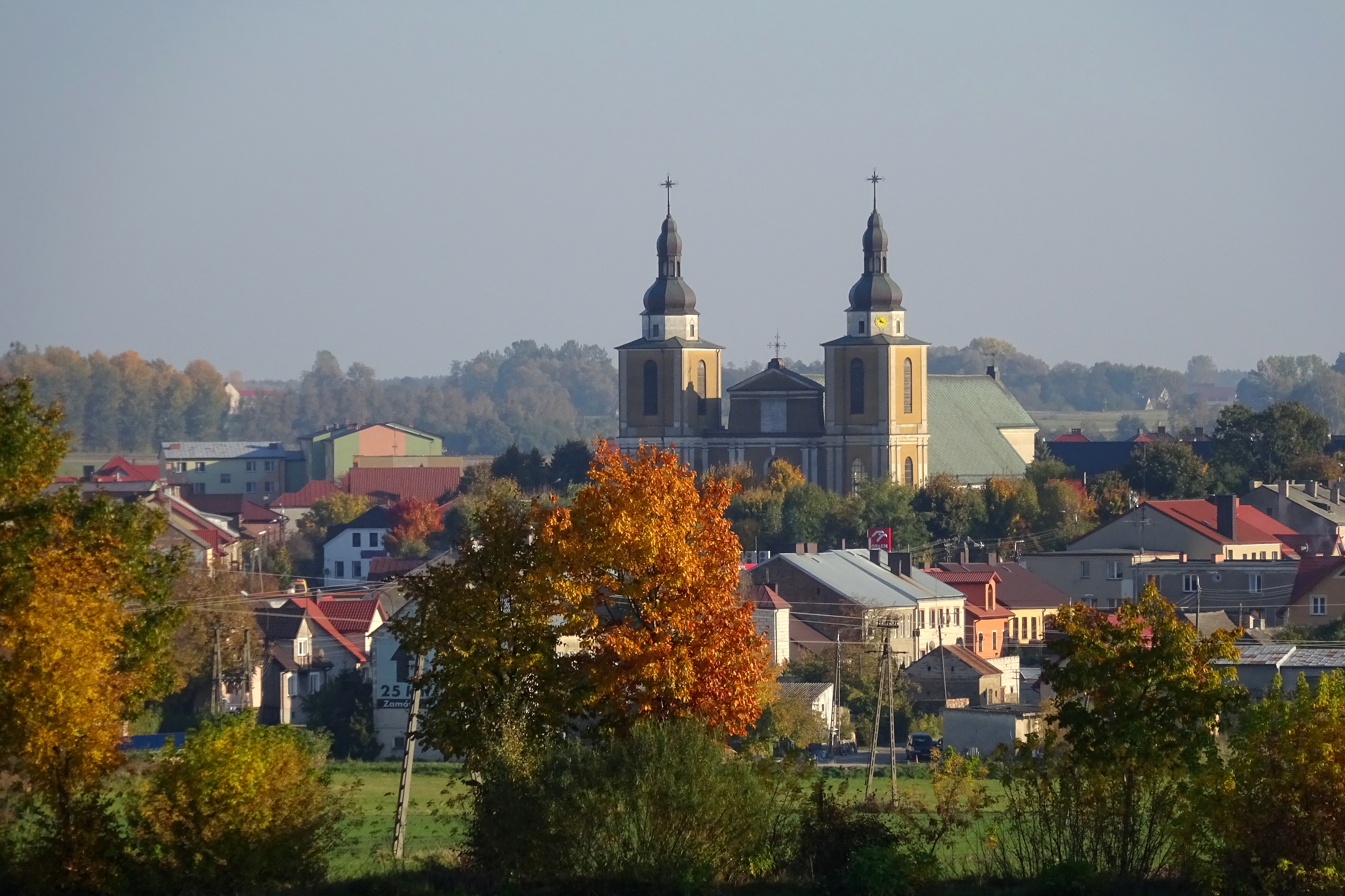 Stawiski (powiat kolneński)